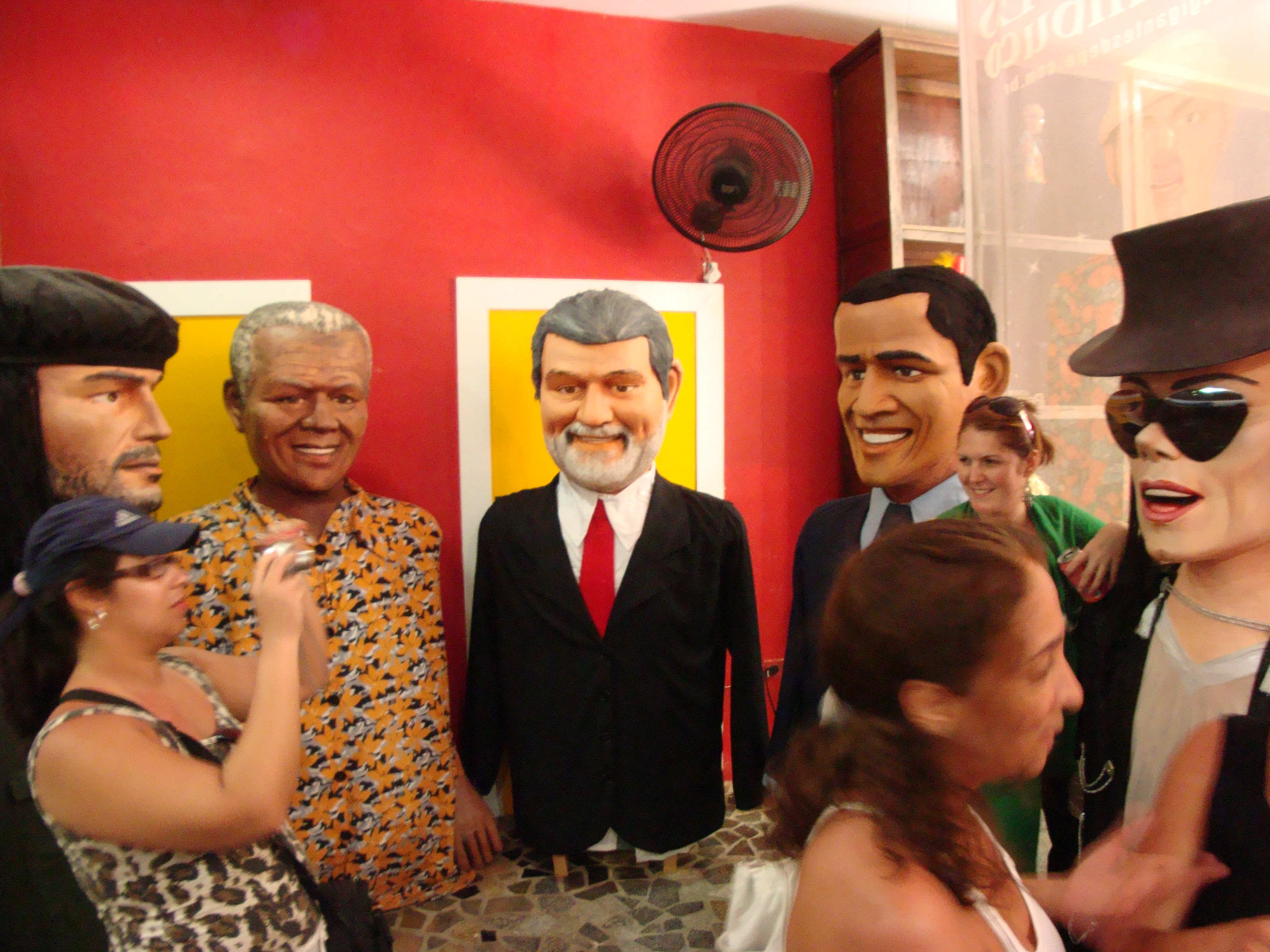 O guerrilheiro Che Guevara, o ex-presidente da África do Sul Nelson Mandela, o ex-presidente do Brasil Luís Inácio Lula da Silva, o presidente dos EUA Barack Obama e Michael Jackson em versões de bonecos gigantes do carnaval de Olinda, Pernambuco. Embaixada dos Bonecos Gigantes - Recife - Pernambuco - Brasil.